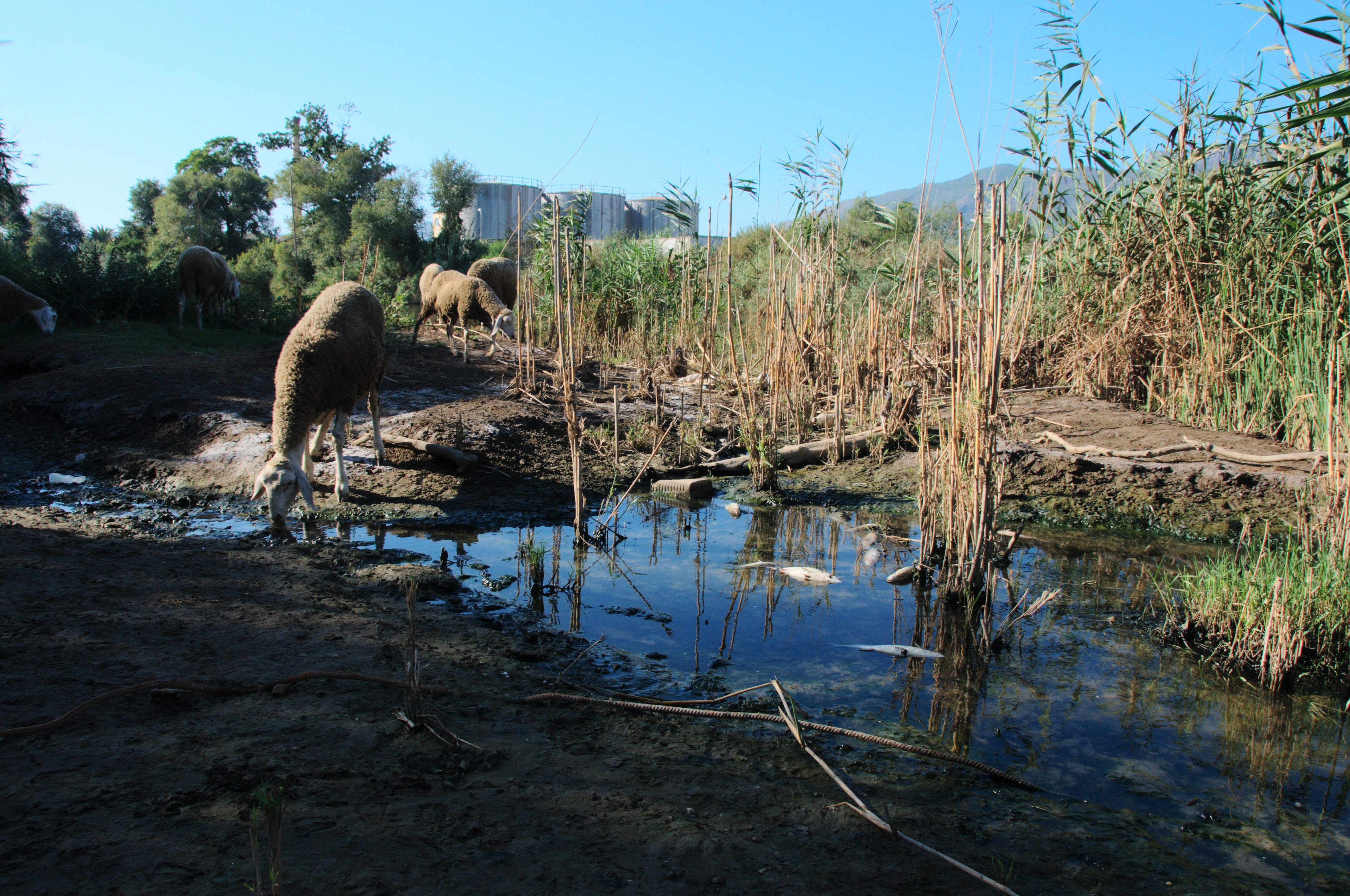 Poissons mort sur l'oued Soummam probablement une pollution aux pesticides suite à des pluies importantes, mouton buvant au milieu, Zone de stackage de pétrole de la sonatrach